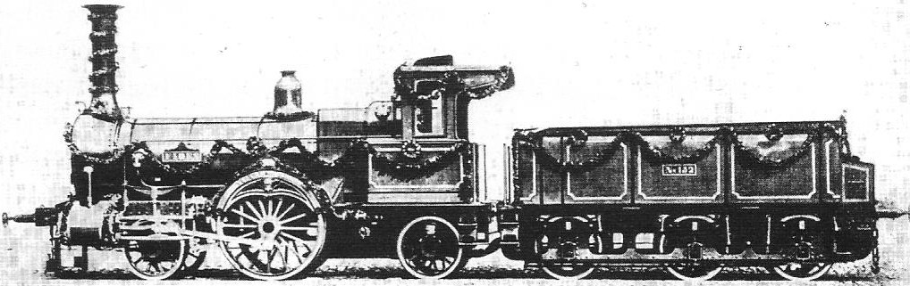 Lokomotive FIDES der Berlin-Stettiner Eisenbahn-Gesellschaft.